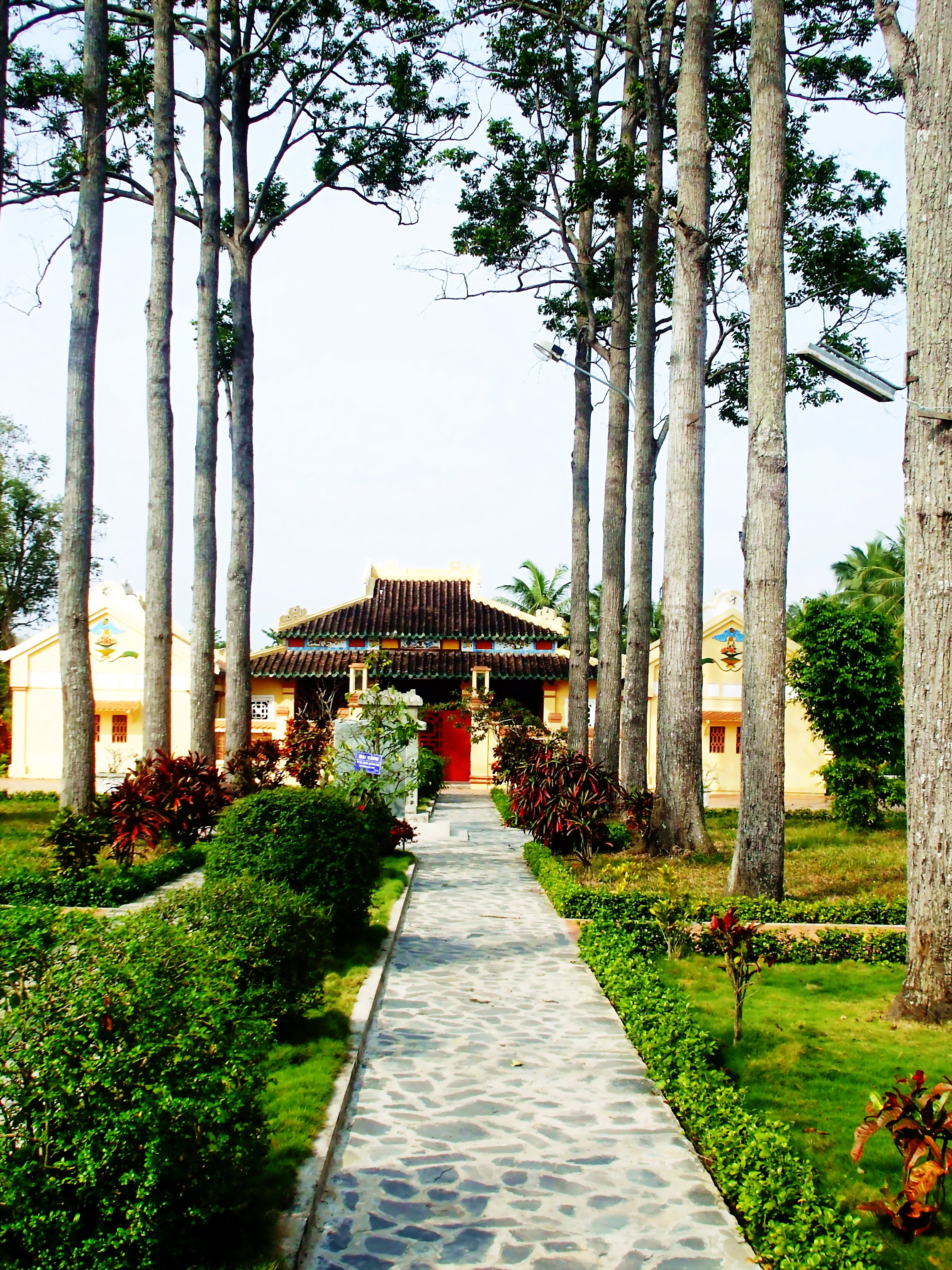 Đường thần đạo dẫn đến điện Đại Thành trong khuôn viên Văn Thánh Miếu Vĩnh Long (TP. Vĩnh Long, Việt Nam).